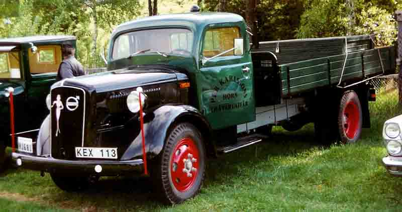 Volvo LV94DT Truck 1937